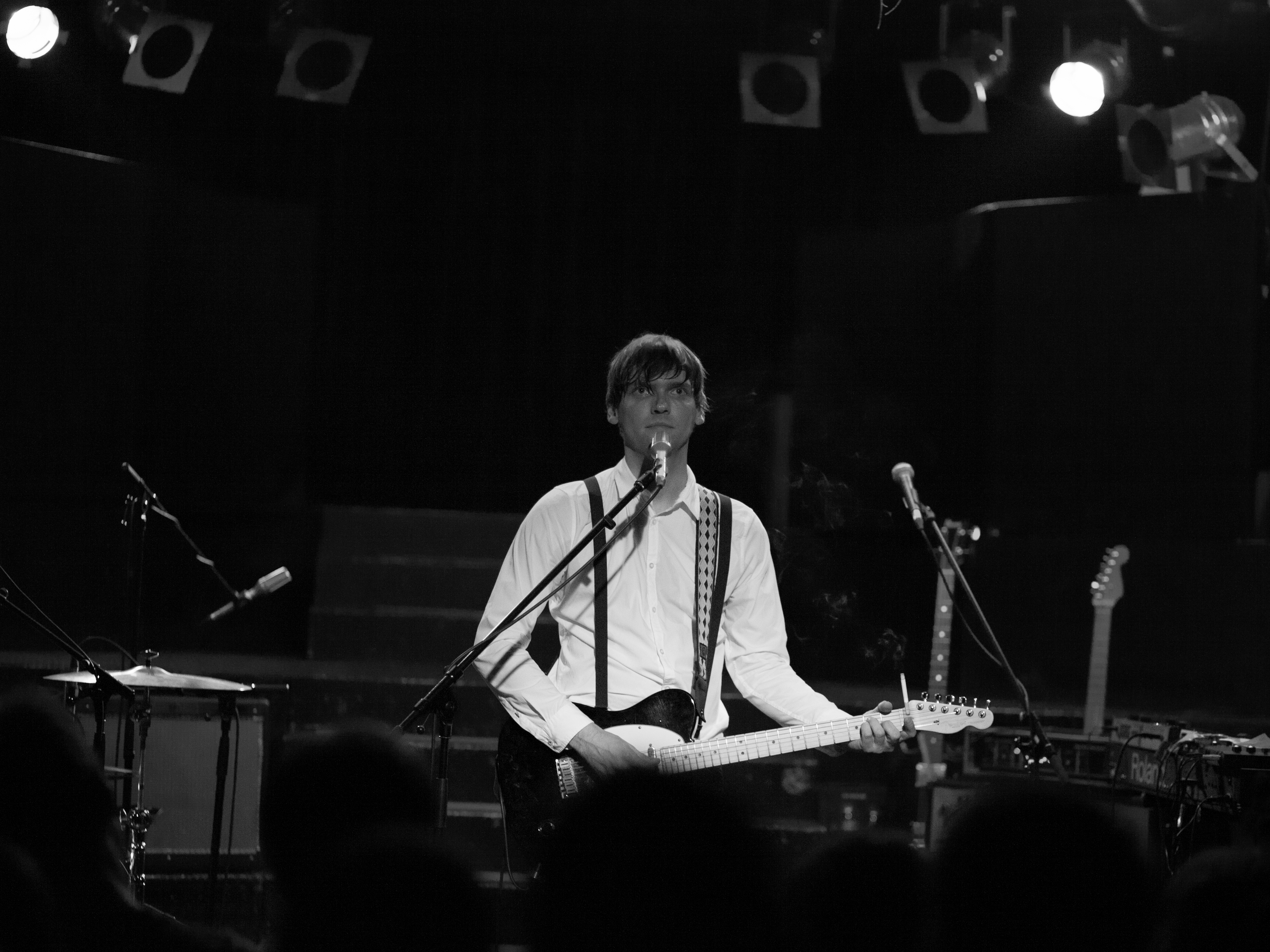 Oliver Gottwald